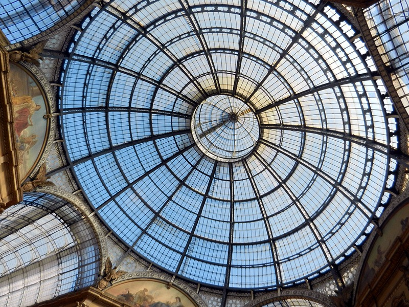 Milano - Galleria Vittorio Emanuele II